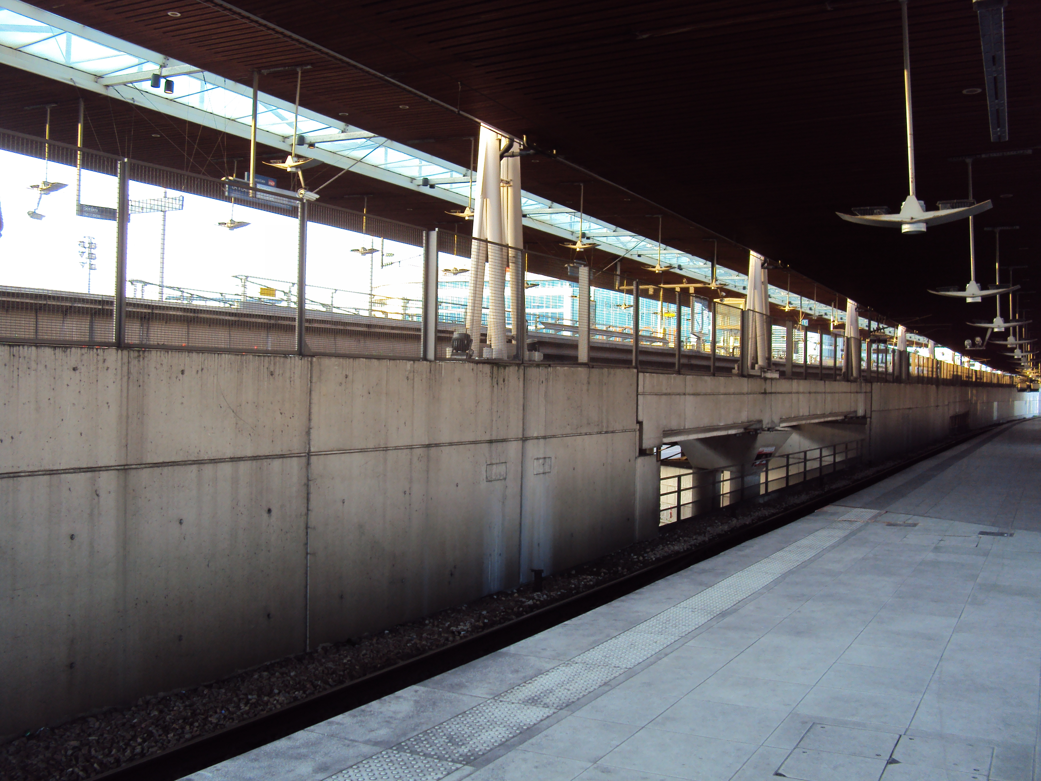 Station la Plaine stade de France rampe d’accès au quai vers Paris